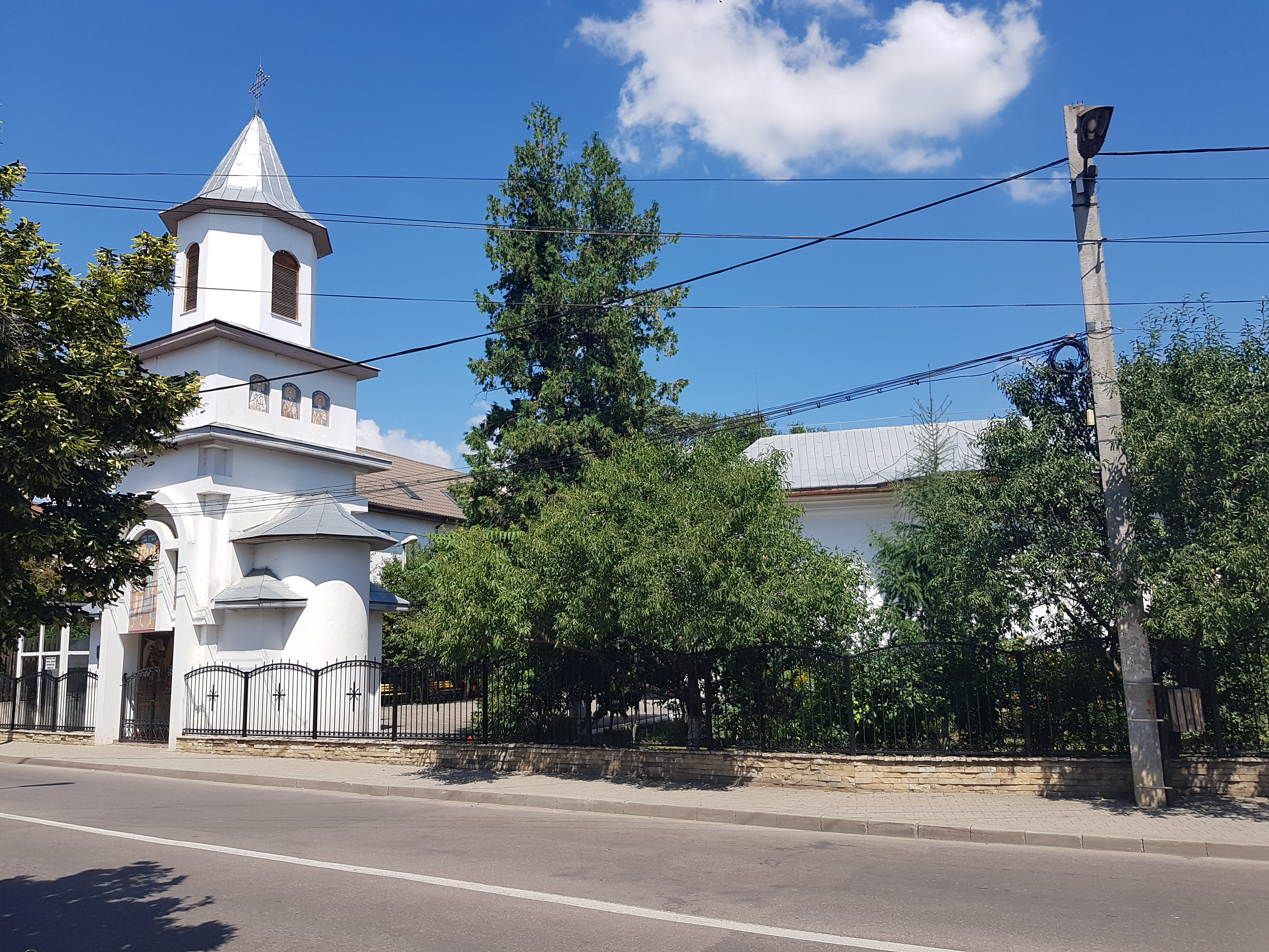 Ansamblul bisericii „Sf. Voievozi” - Stamatinești